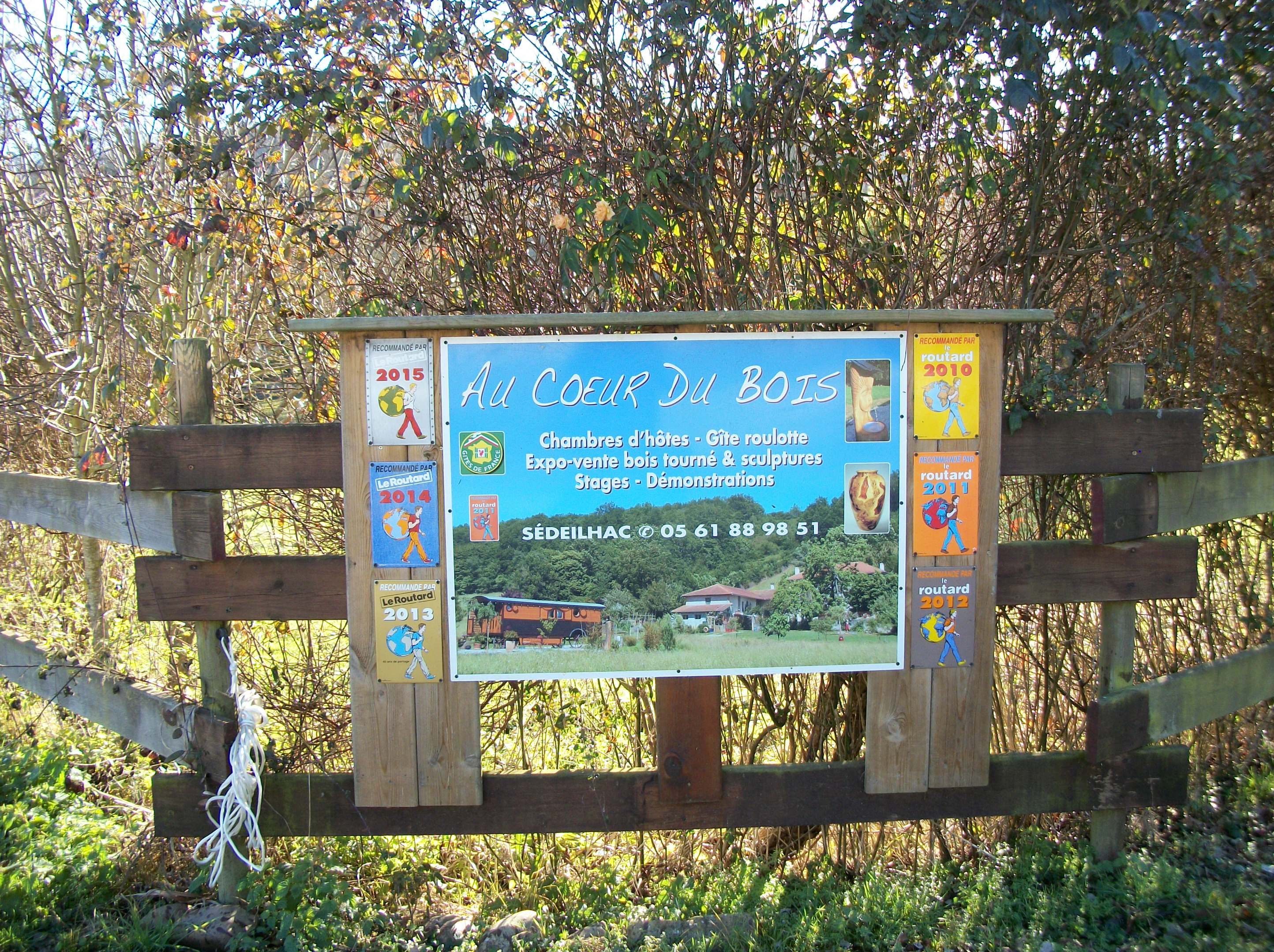 Au cœur du Bois regroupe une maison d'hôte et un atelier où est organiser des stages de formations de tournage sur bois